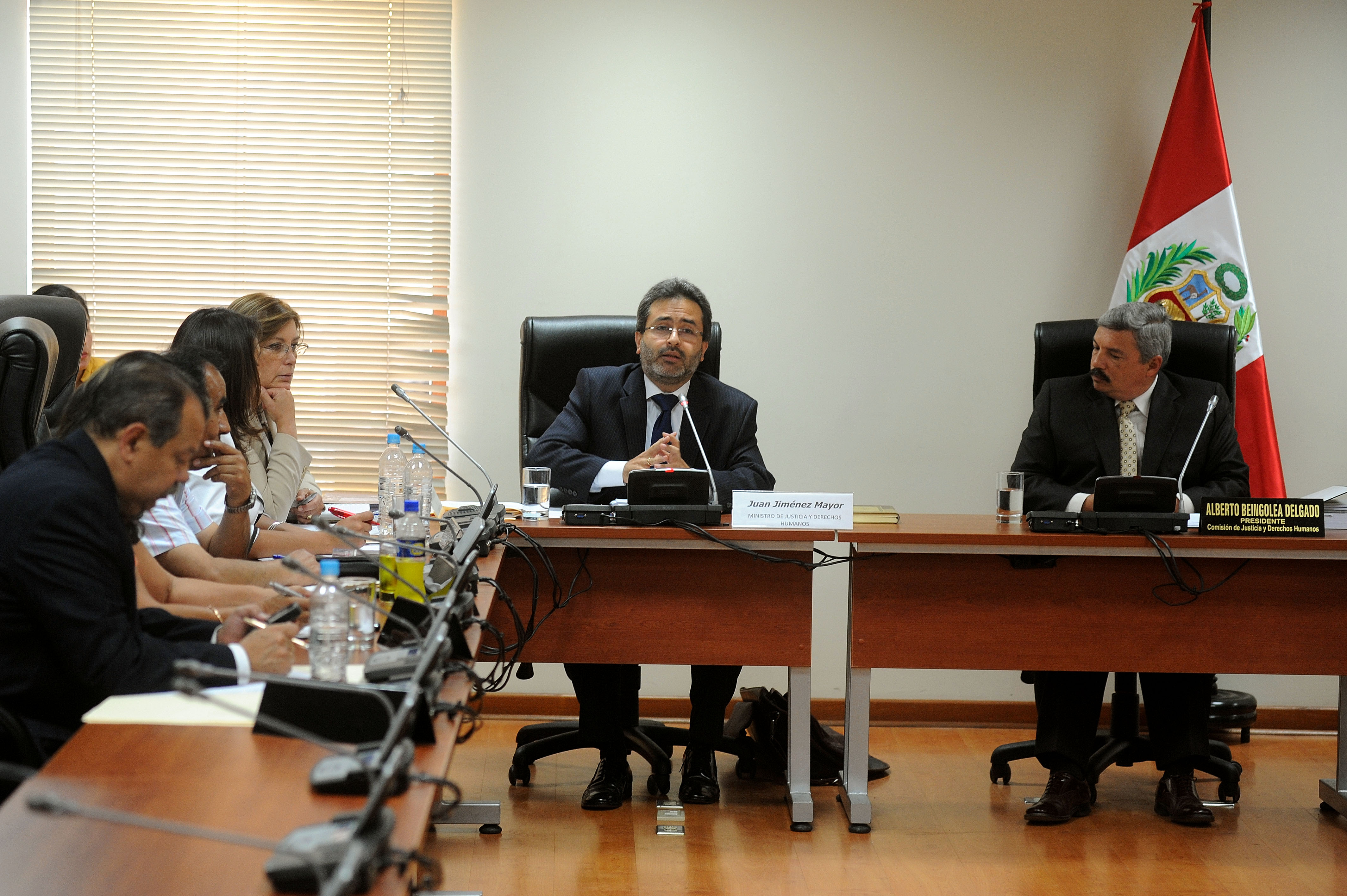 El ministro de Justicia, Juan Jiménez Mayor, se presentó hoy en la Comisión de Justicia y Derechos Humanos para responder sobre temas puntuales que le fueron solicitados por ese grupo dictaminador. Entre los asuntos abordados figura la estrategia trazada por el Estado respecto a denuncias planteadas en contra del Estado en la Corte Interamericana de Derechos Humanos.